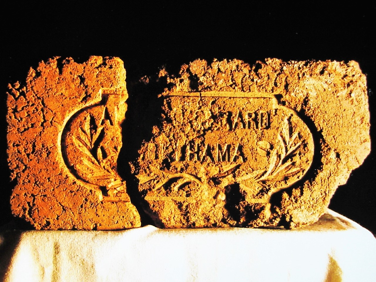 月桂樹刻印入りジェラール煉瓦 横浜 元町公園出土